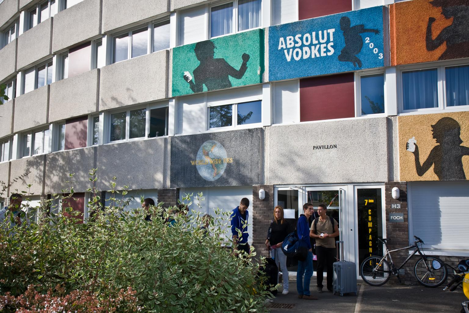 Campus de l'École polytechnique, Bâtiment élève (casert).